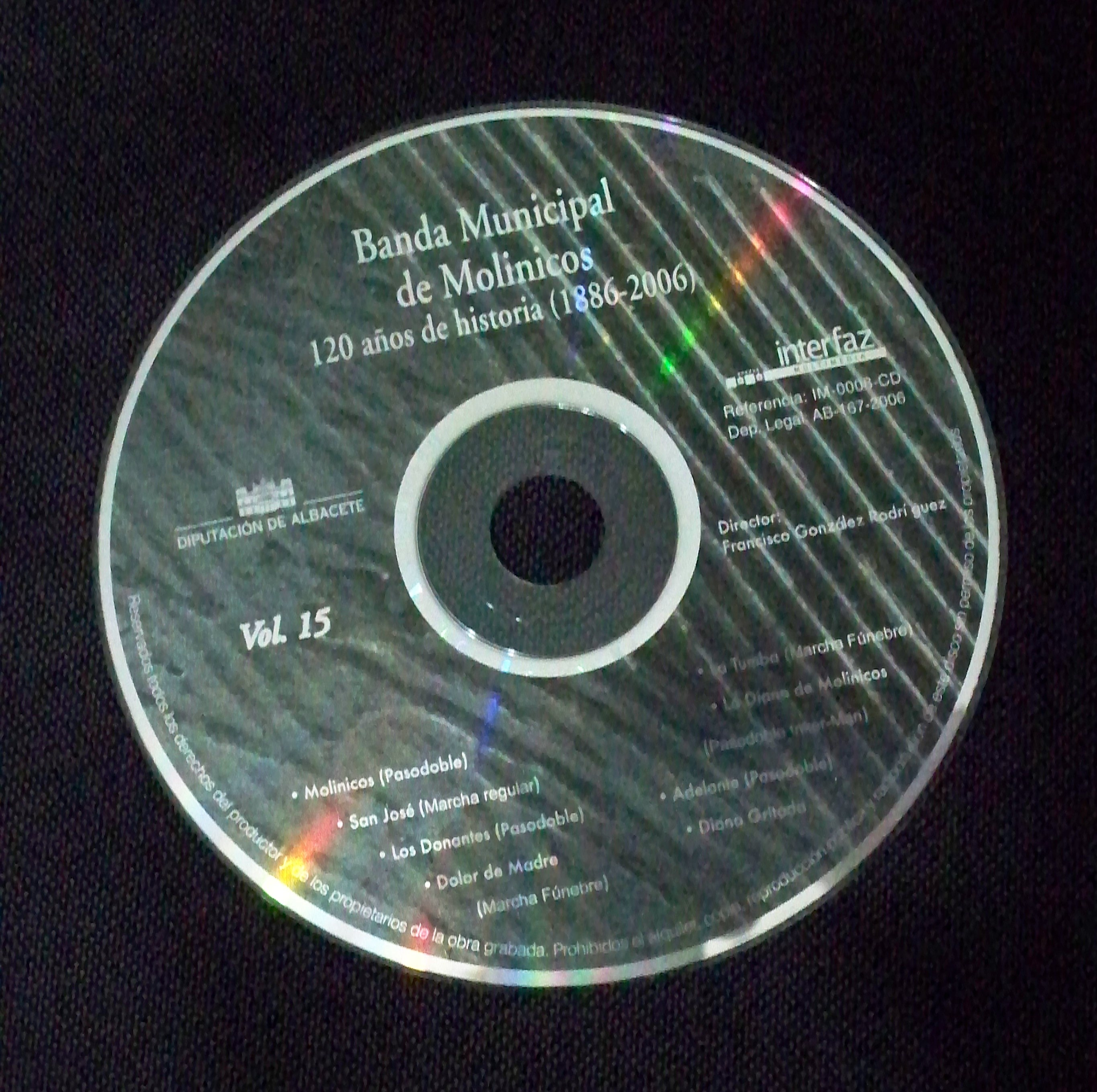 CD recopilatorio del 120 aniversario de la fundación de la Banda de Música Municipal de Molinicos (Albacete)